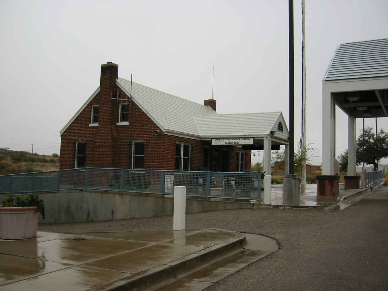 Sasabe old border station